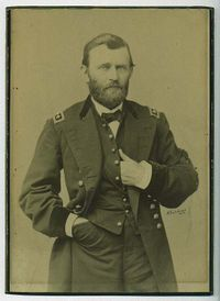 Il Generale |Ulysses S. Grant||it (1822-1885)